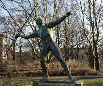 Karl Möbius: Speerwerfer (1921), 1944 eingeschmolzen, Nachguss 1954